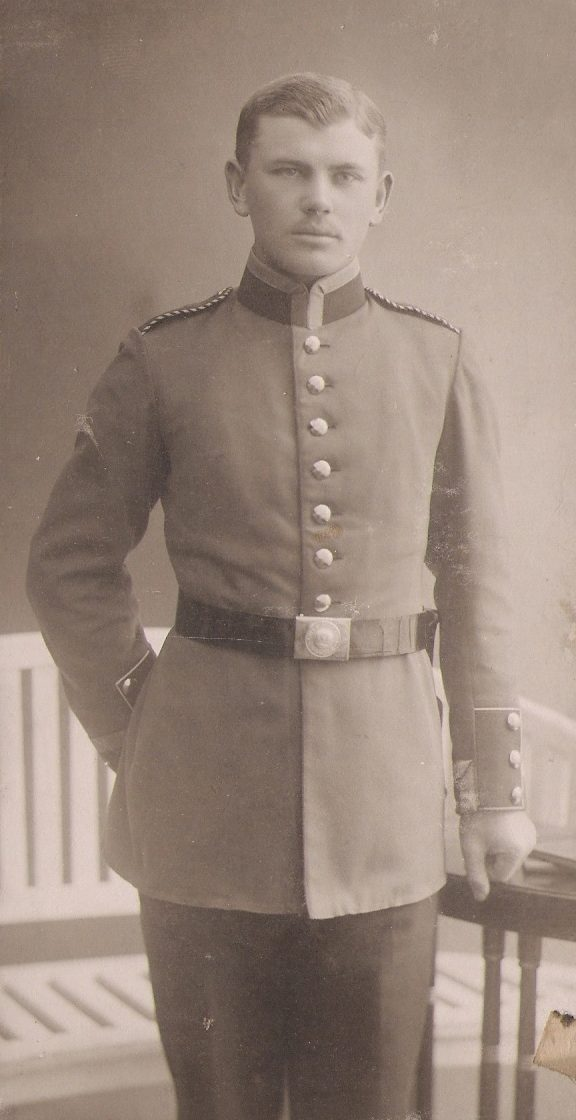 Edward Pawłowski jednoroczny ochotnik w barwach 47 pułk piechoty pruskiej